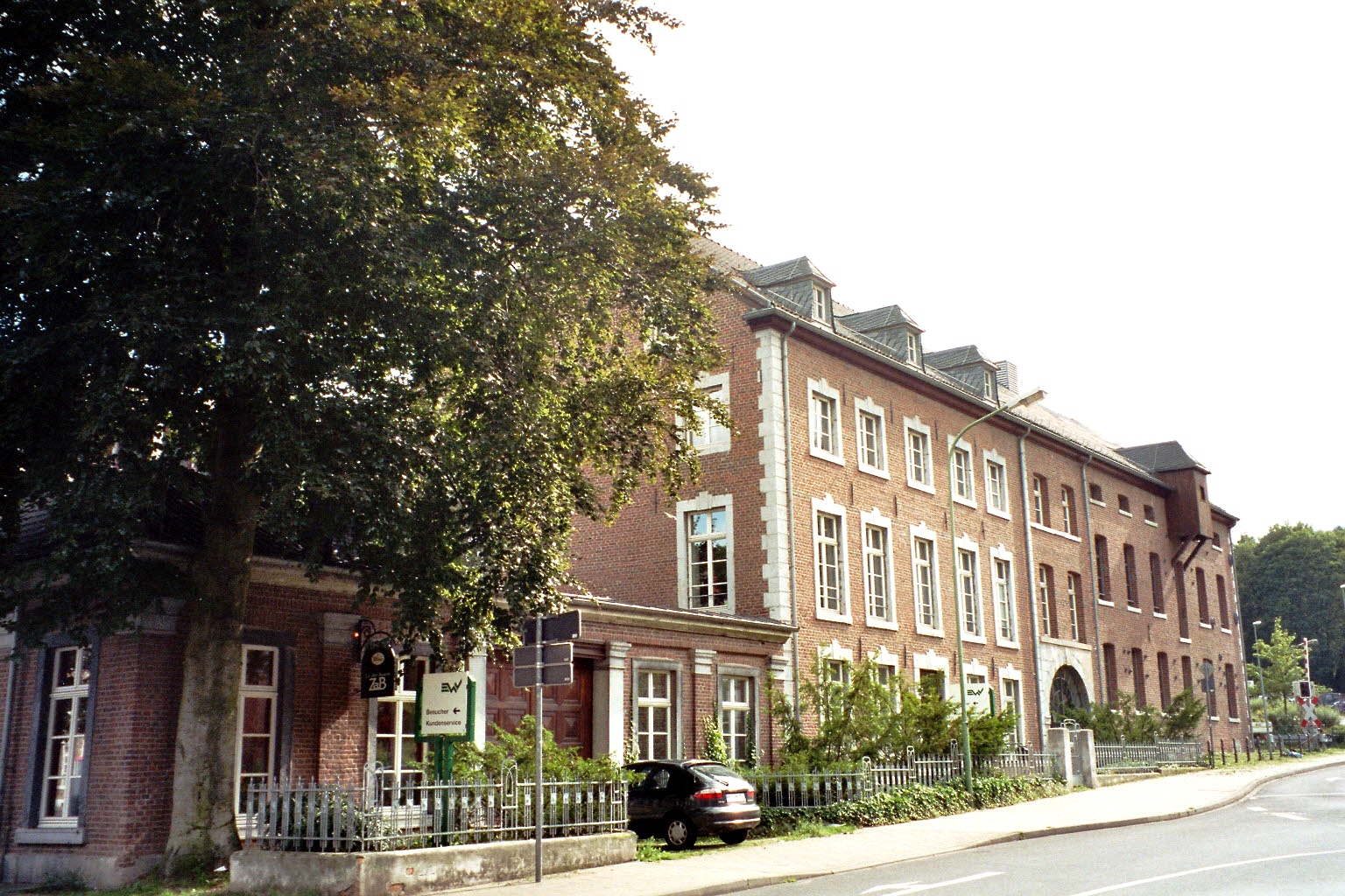 Verwaltungssitz_der_EWV_in_der_ehem._Ketschenburg-Brauerei_in_Stolberg